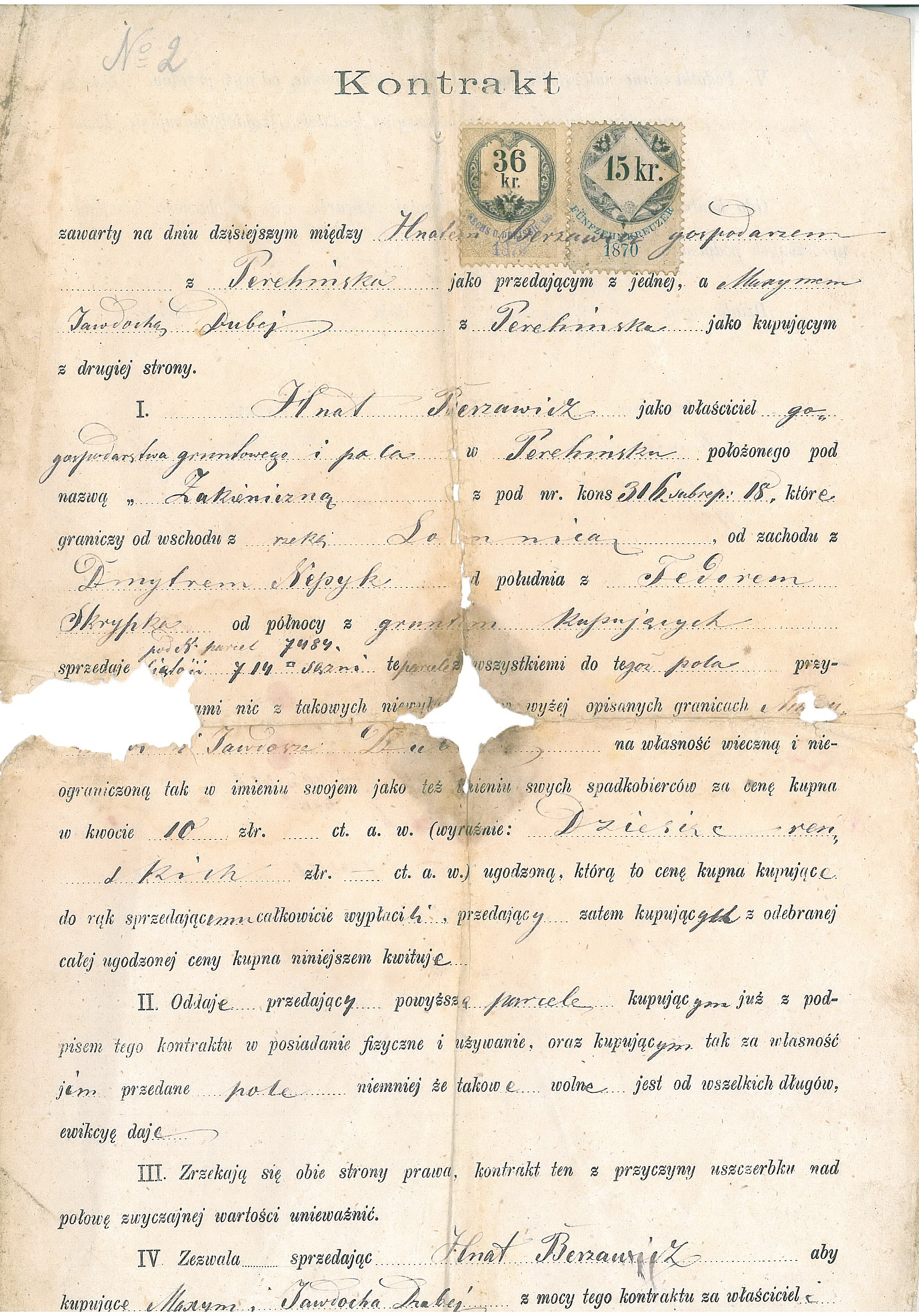 Засвідчено контракт між Гнатом Бержавичем як про- давцем з однієї сторони і Максимом та Явдохою Дубеями як покупцями з іншої. Контракт стосується продажу поля, названого Закерничним, що лежить між річкою Лімницею зі сходу, маєтком сусіда Дмитра Непика із заходу, маєтком Федора Скрипки з півдня, і землею покупців з півночі ці- ною в 10 злотих. Це і є перша згадка про поле, яке невдовзі стало поселенням, а потім селом. Серед свідків вказано Дмитра Шляхтича.